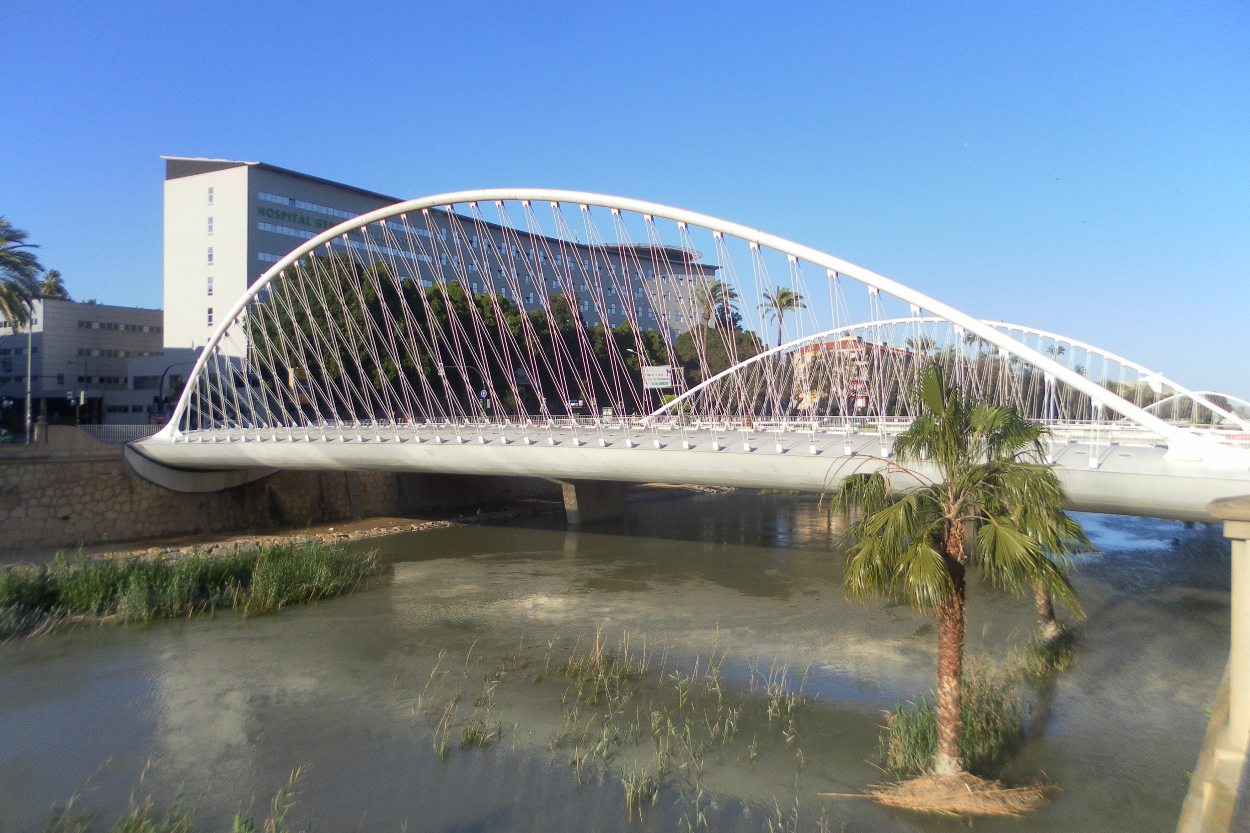 Imagen del Puente del Hospital (Murcia, España) sobre el río Segura. Diseño de Santiago Calatrava.